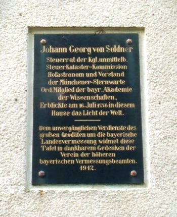 Gedenktafel für Johann Georg von Soldner am Wohnhaus des Georgenhofes bei Feuchtwangen